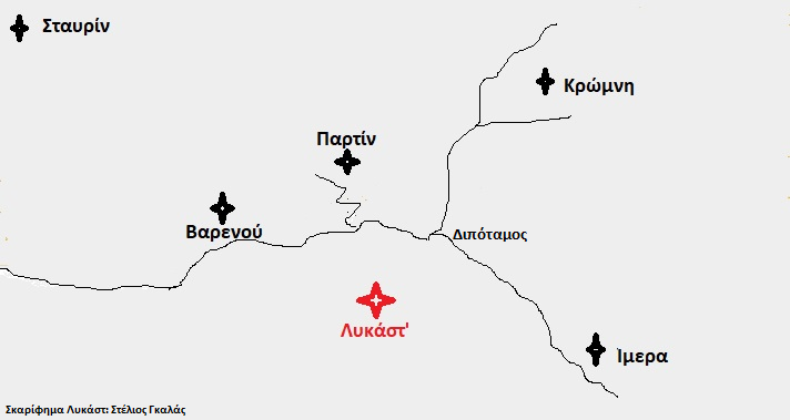 Ligas